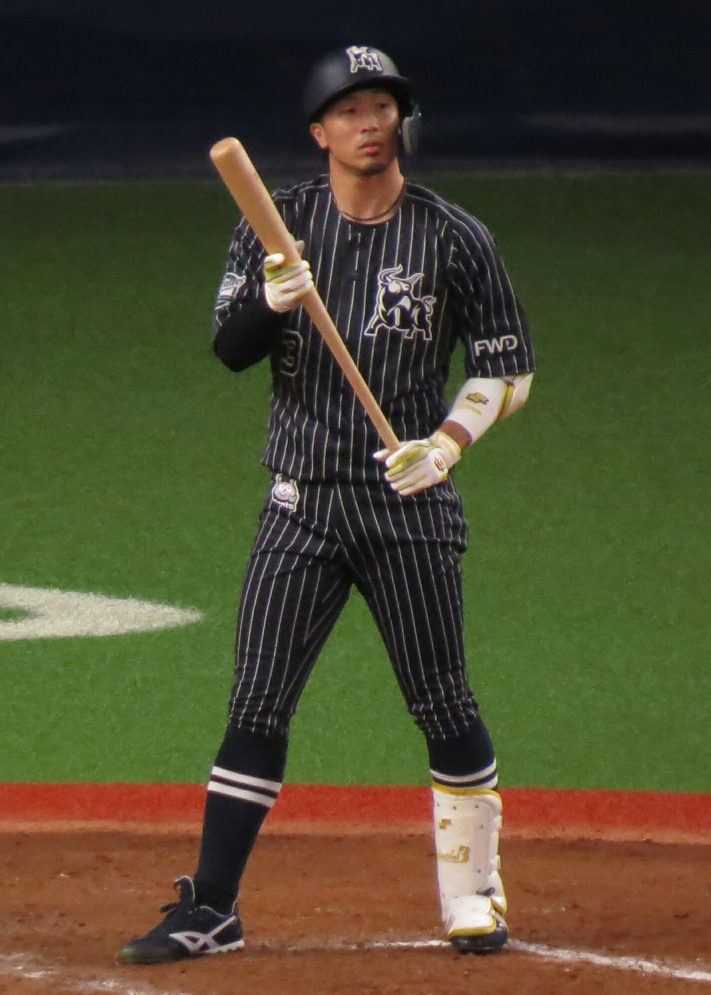 安達了一 20200809 オリックスバファローズ プロ野球